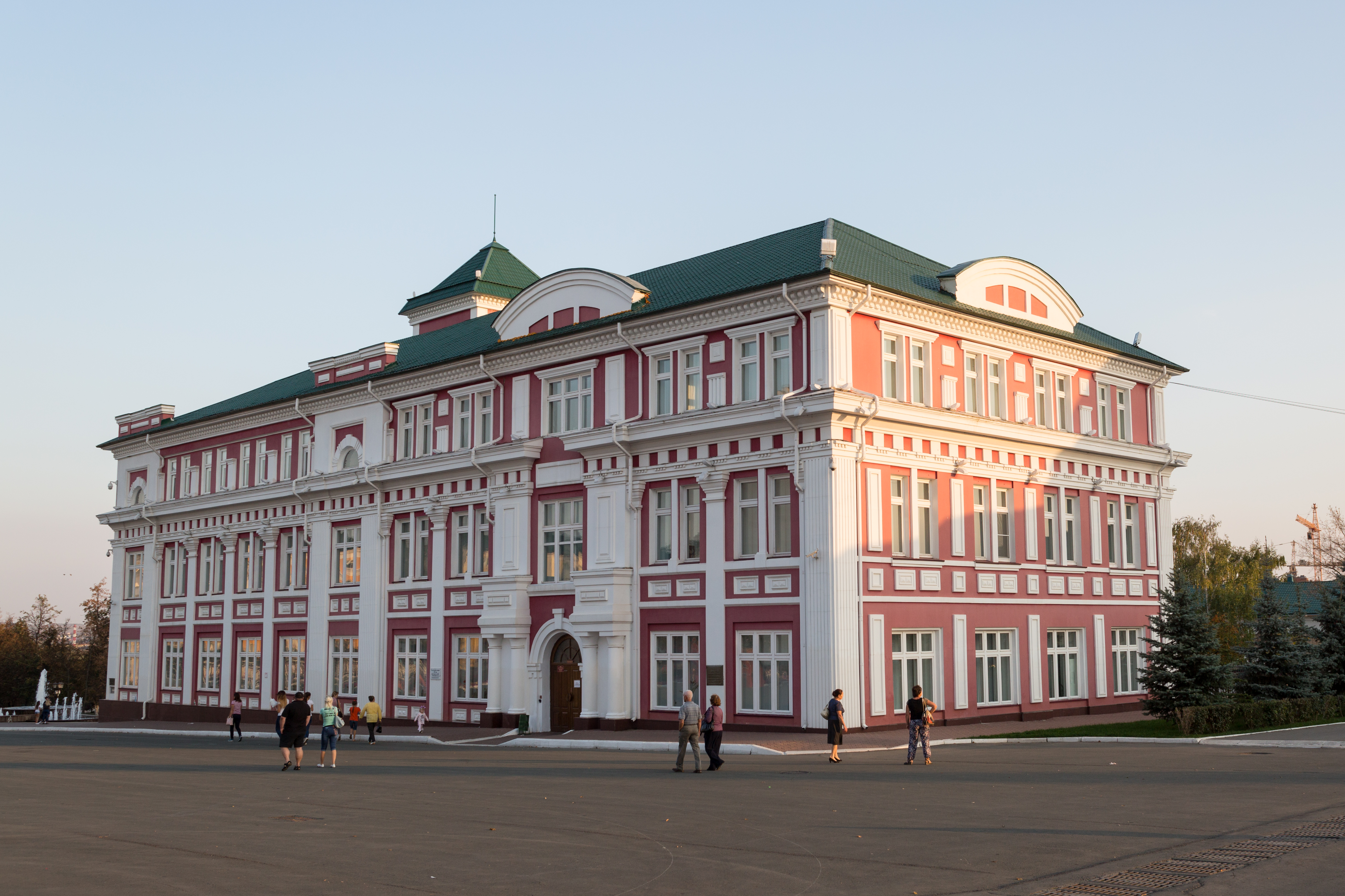 Дом, в котором был создан первый саранский уездный комитет РКП(б) и была провозглашена советская власть в уезде: улица Советская, 30, Саранск, Мордовия